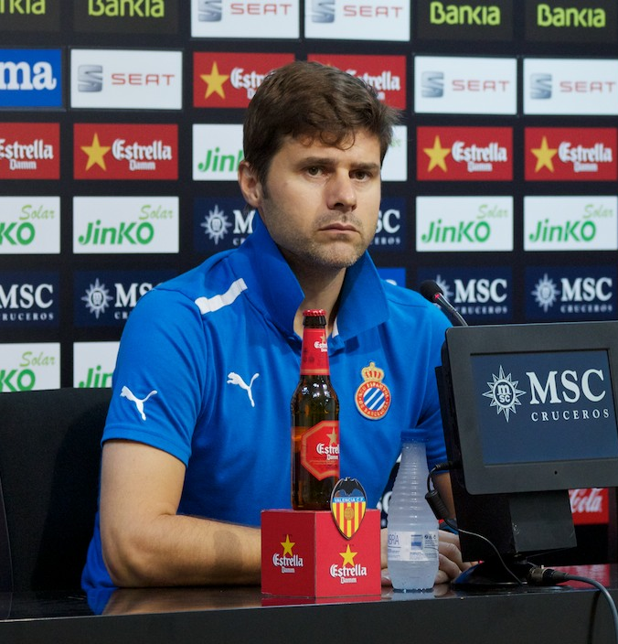 Valencia CF - Español 2012 #41